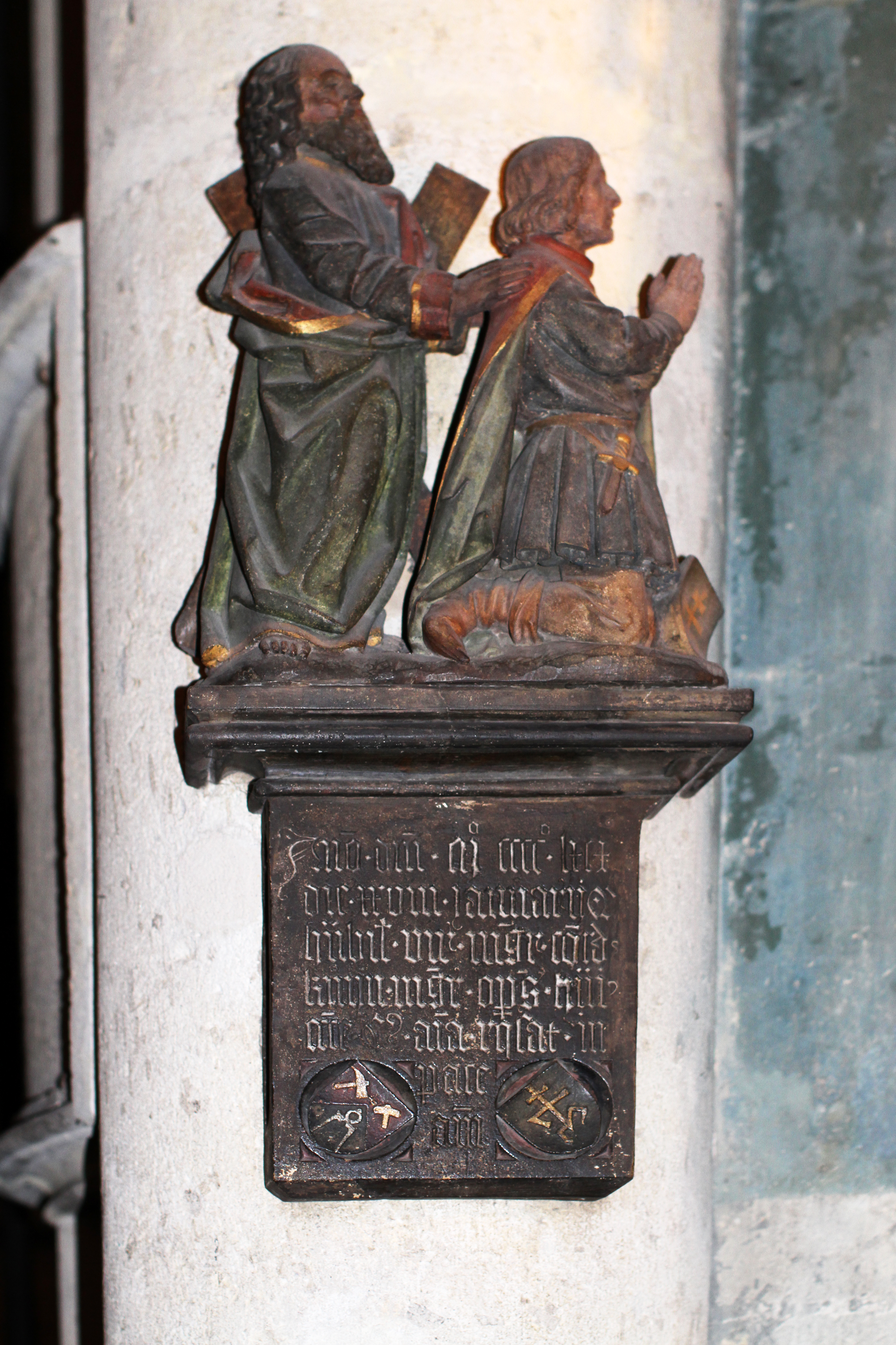 Dom zu Köln, nördliches Querhaus. Epitaph des Dombaumeisters und Bildhauers Konrad Kuyn († 1469)